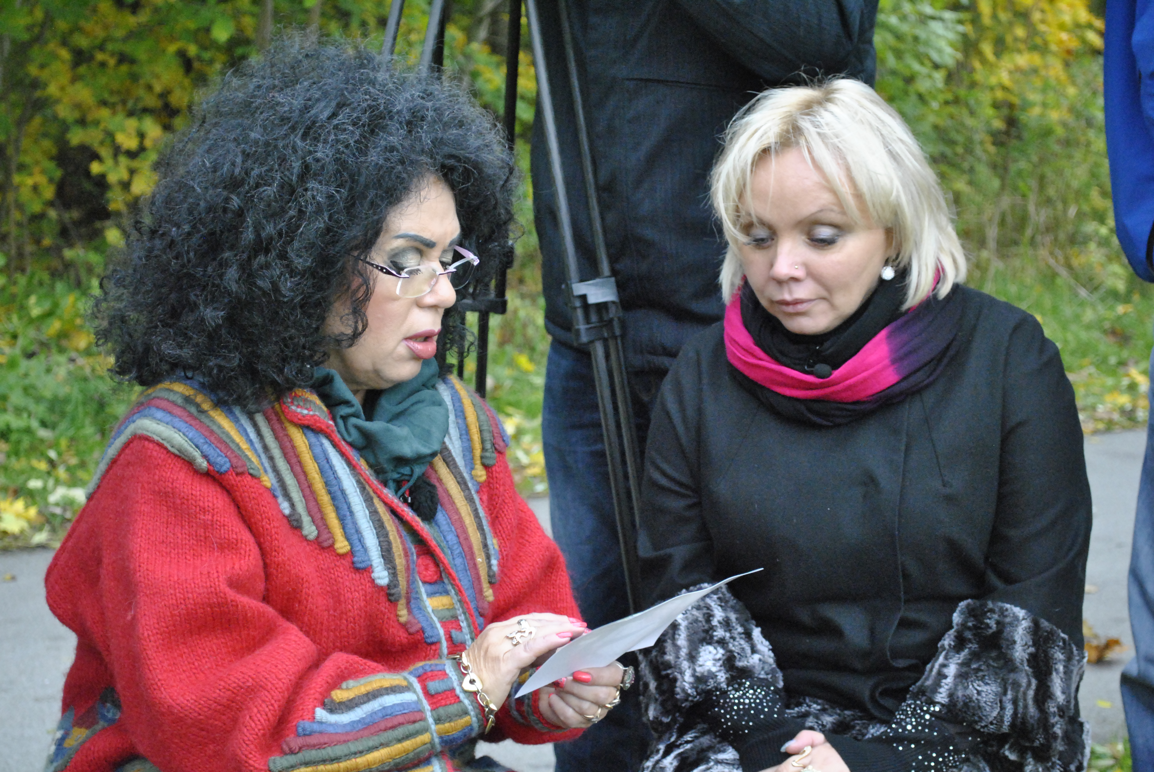 Илона Калдре и Алёна Орлова